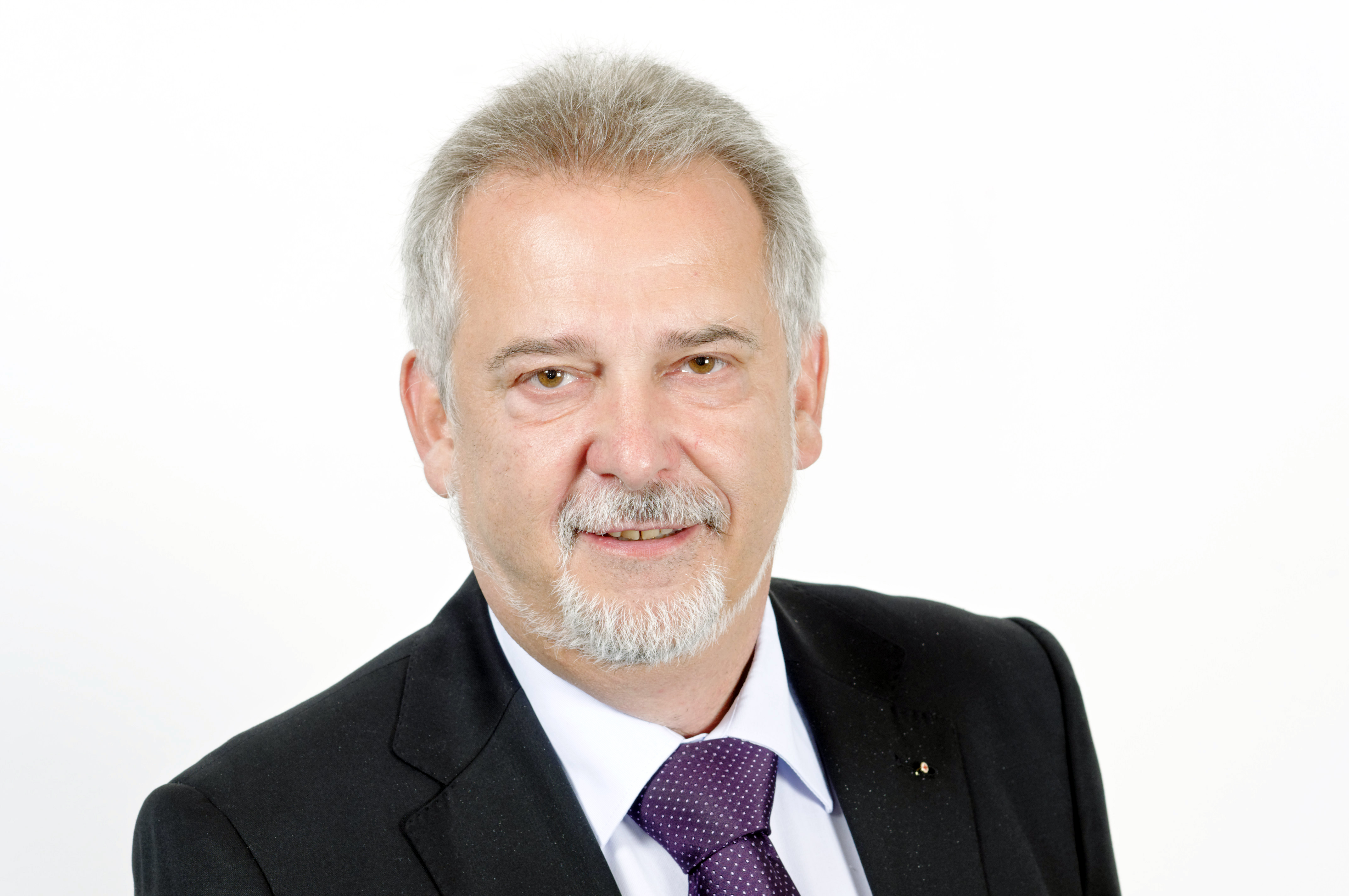 Gerhard Günther - Mitglied des Thüringer Landtages